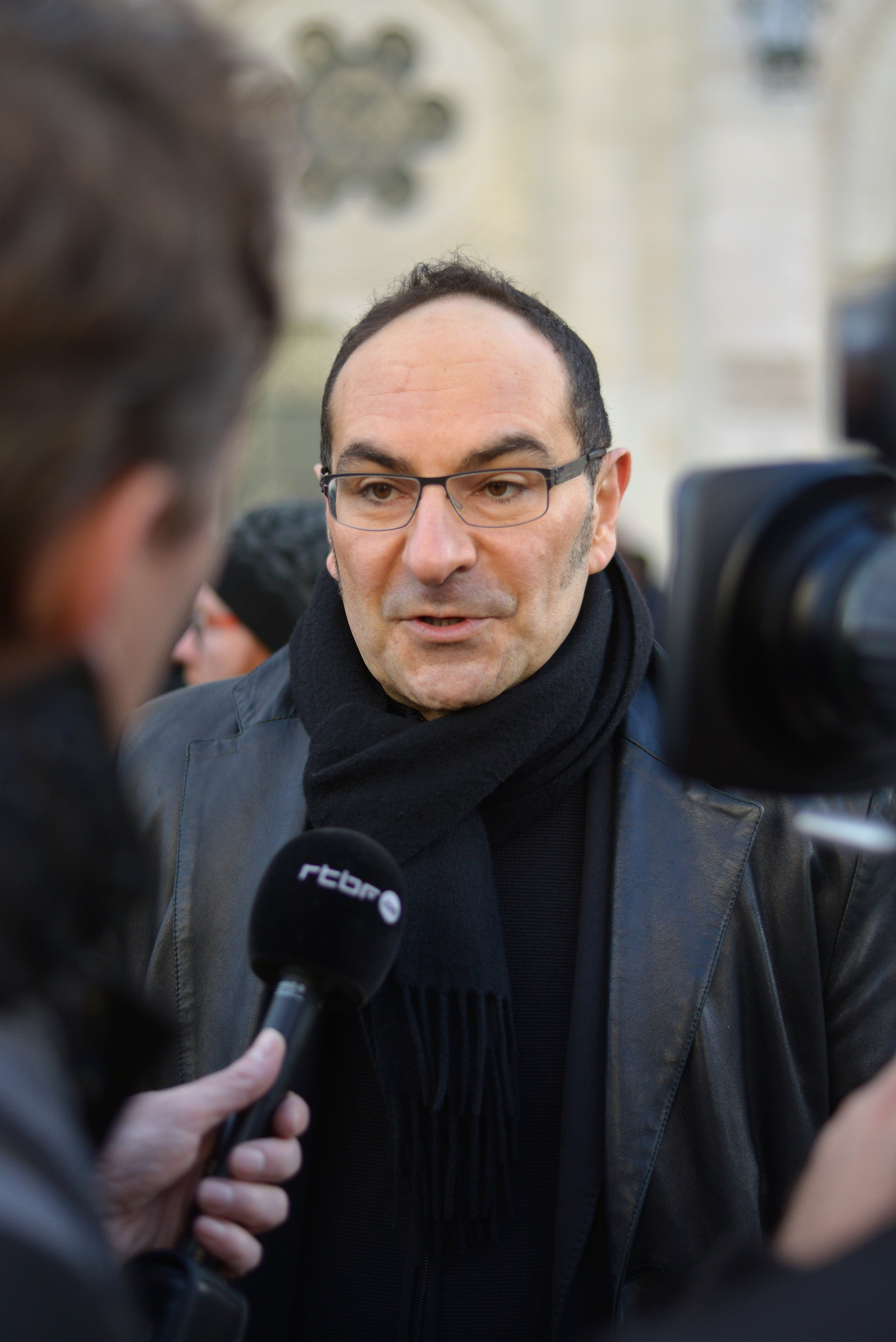 Christophe Arleston à la Marche des auteurs de bande dessinée le 31 janvier 2015 lors du Festival d'Angoulême.